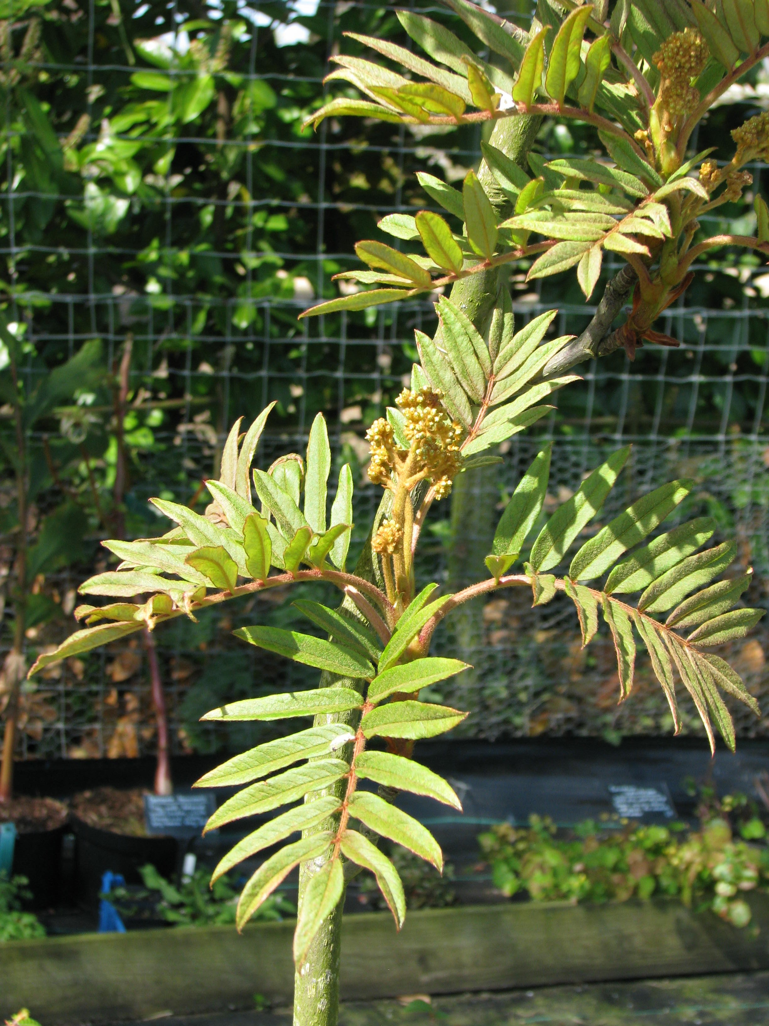 Sorbus insignis